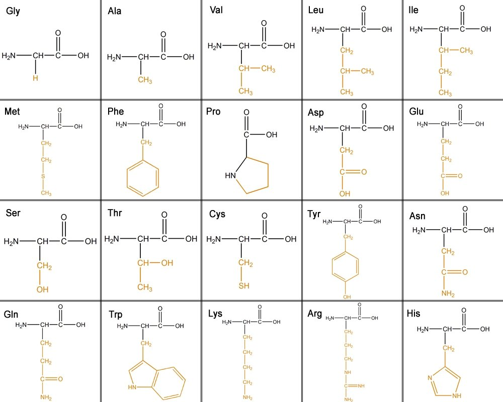 tabelarni prikaz 20 aminokiselina